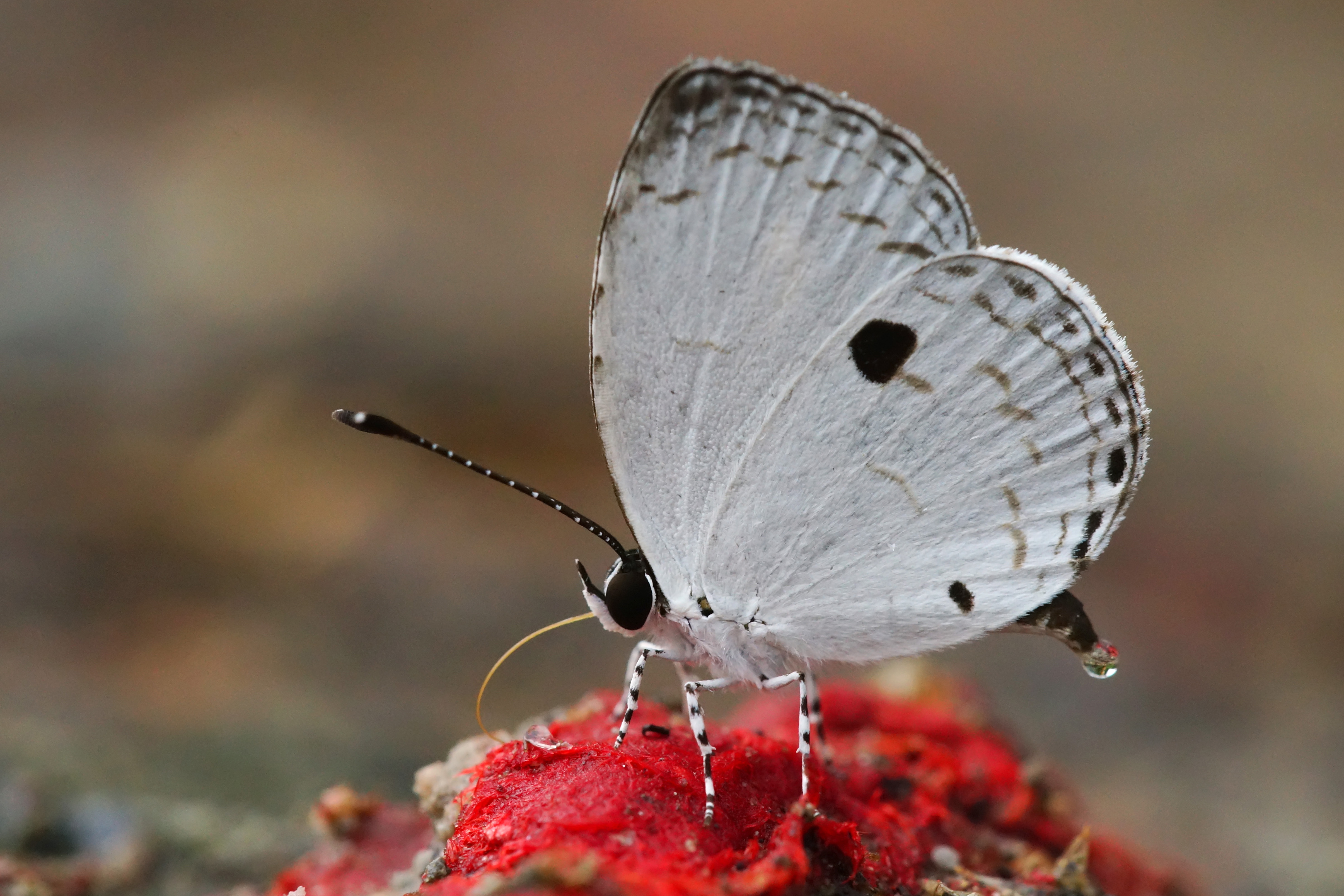 黑點灰蝶 Neopithecops zalmora